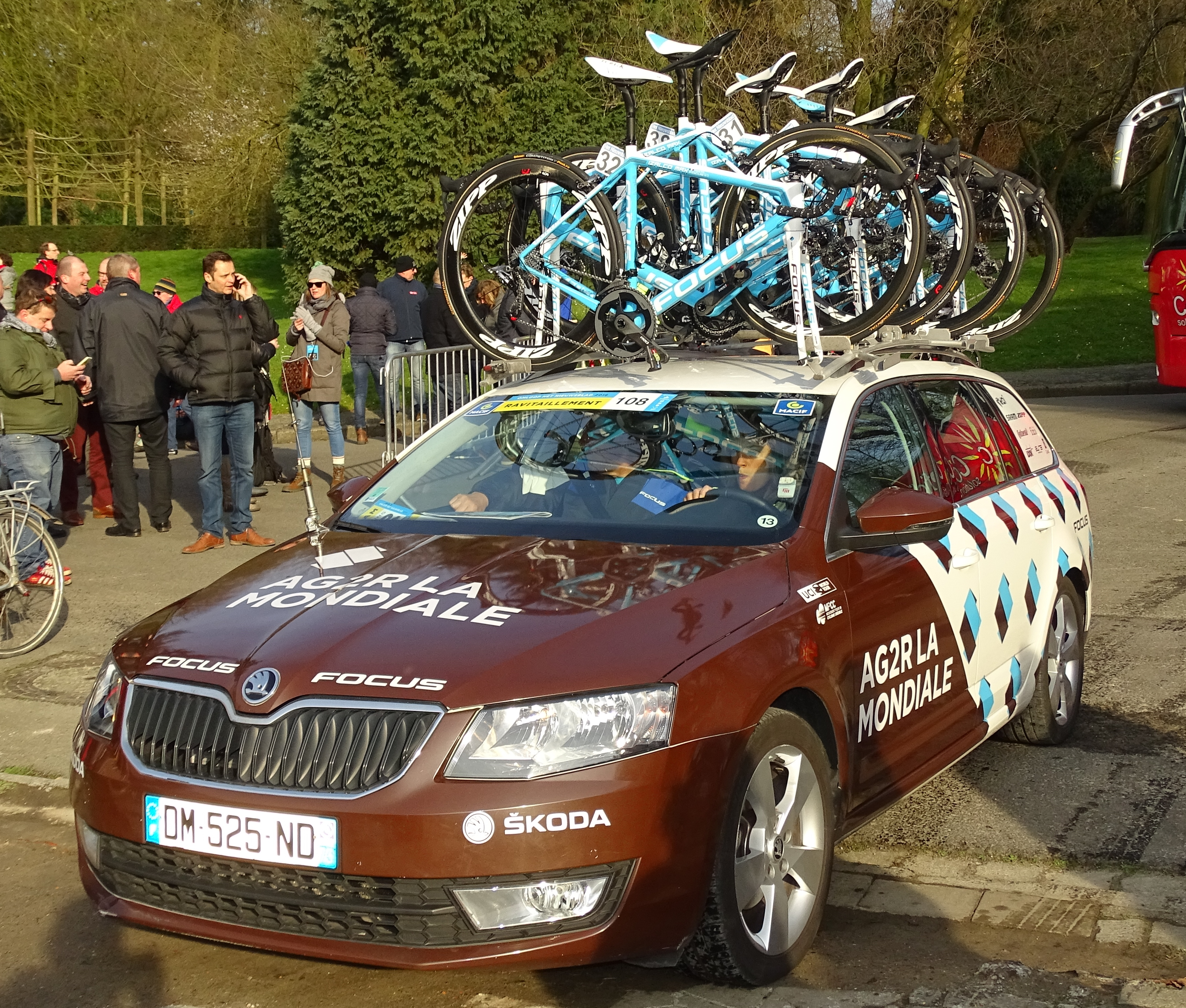 Reportage réalisé le samedi 27 février à l'occasion du départ et de l'arrivée du Circuit Het Nieuwsblad 2016 et de l'arrivée du Circuit Het Nieuwsblad féminin 2016 à Gand, Belgique.